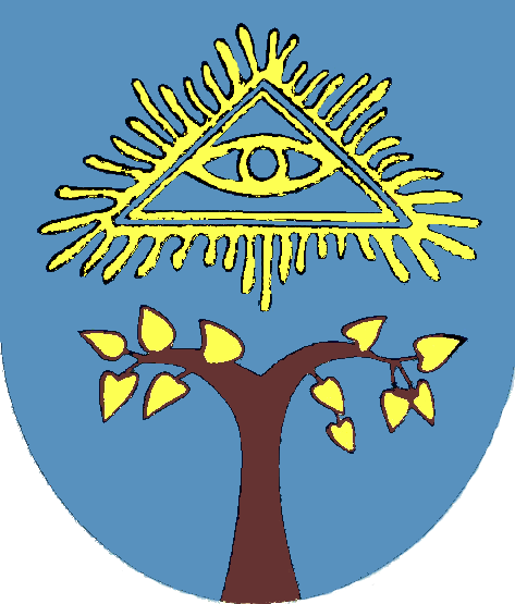 Herb Międzyrzecza Górnego